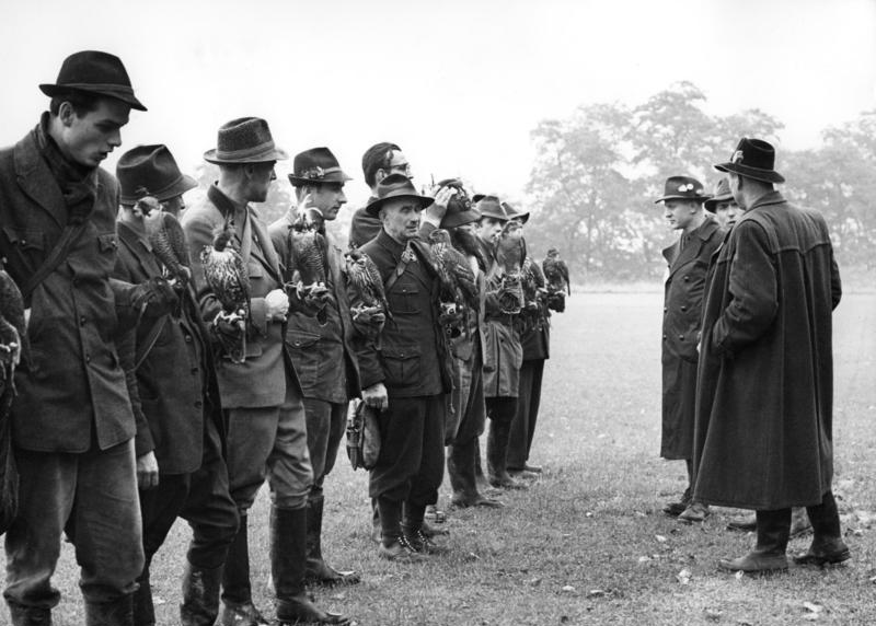 Falkenbeize in Xanten, Nordrhein-Westfalen Die Falkner beim Schaufliegen von links nach rechts: Wanderfalk, Präriefalk, Wanderfalk, Präriefalk, Habicht rot, Habicht alt, Habicht jung